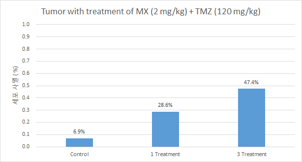 염기절단복구를 응용한 대장암 치료방법